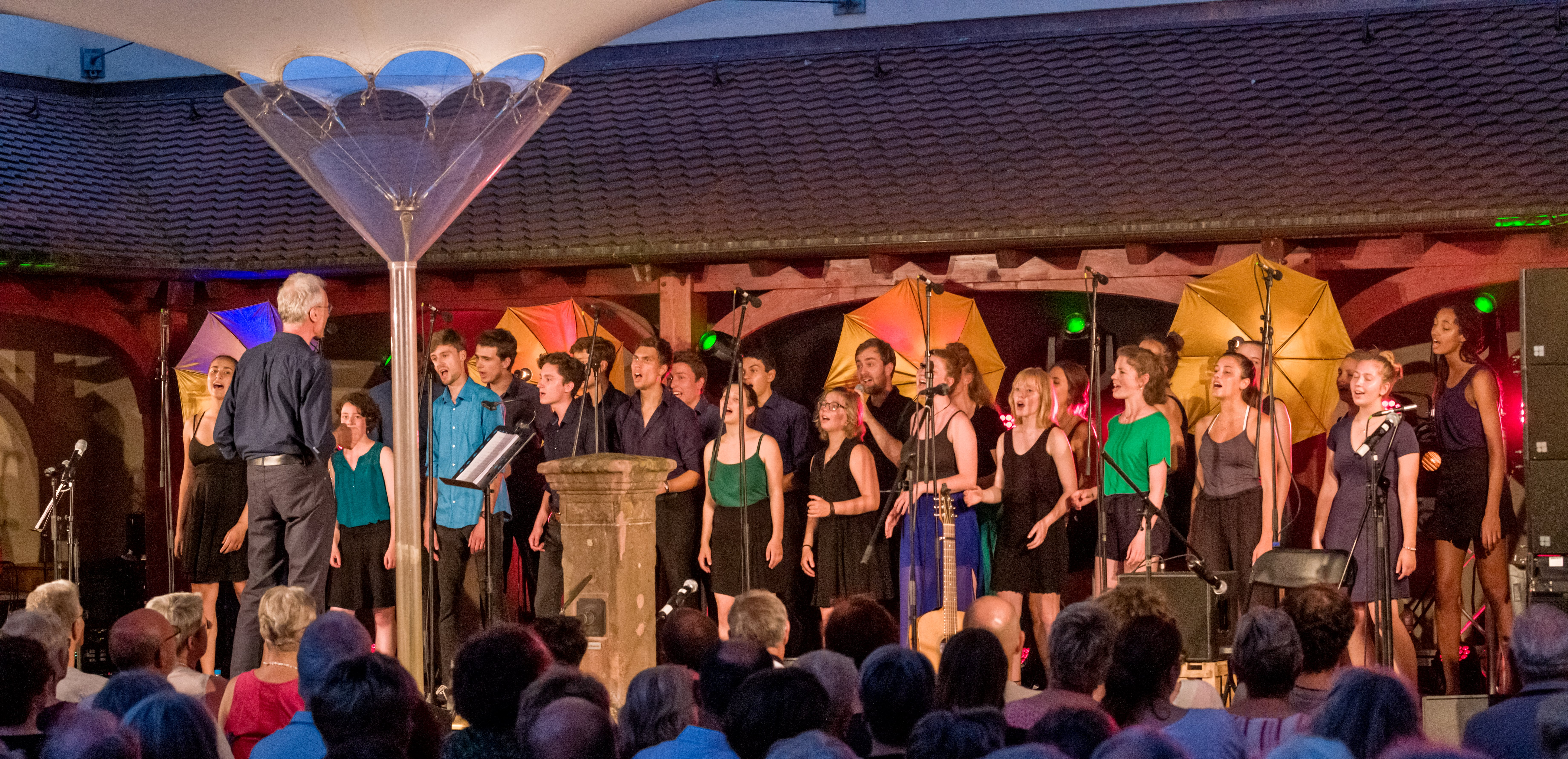 Bilder vom Black Forest Voices Festival in Kirchzarten. Ein Festival mit Workshops für Chöre und A Capella Gesang vom 27. 6. 2019 zum 30.06. 2019